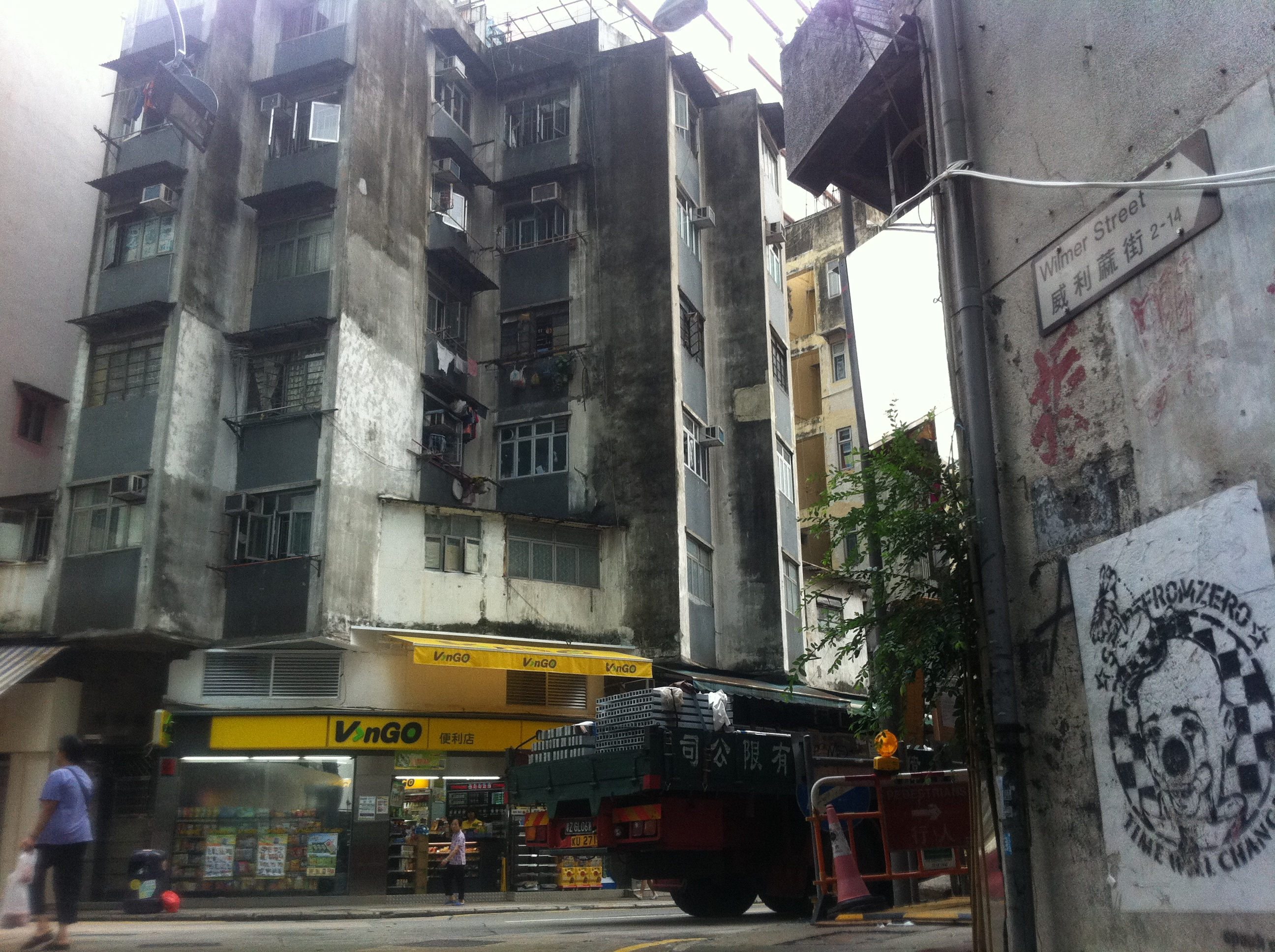 中文（香港）: 香港島皇后大道西 威利麻街望zh:建興樓